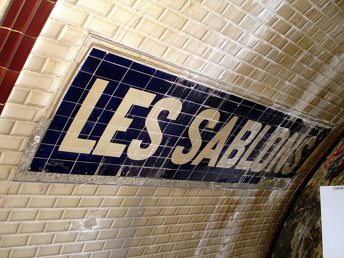 La station Les Sablons de la ligne 1 du métro de Paris en cours de décarrossage, France